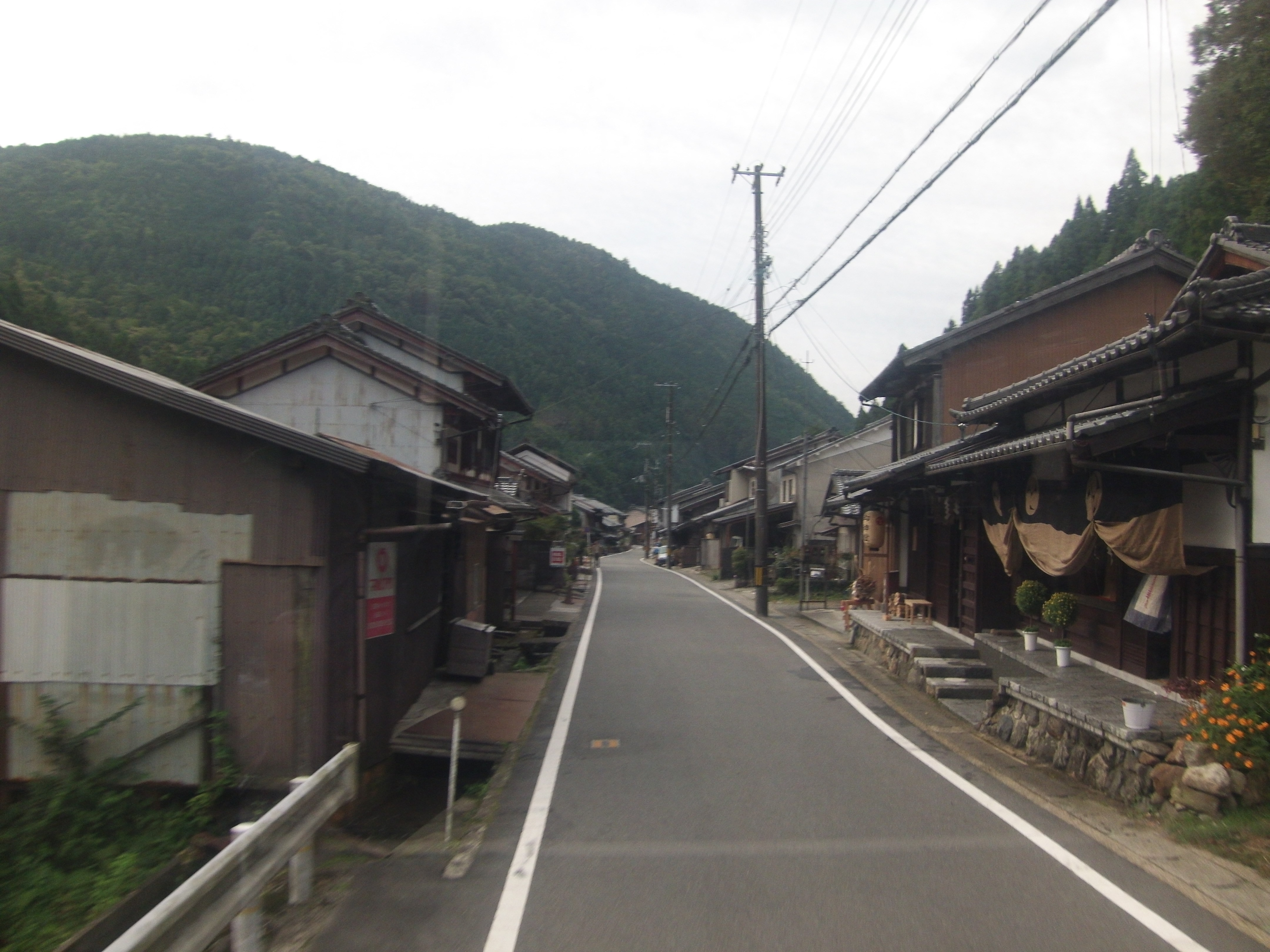 鞍馬の集落を抜ける京都府道38号線（鞍馬街道）